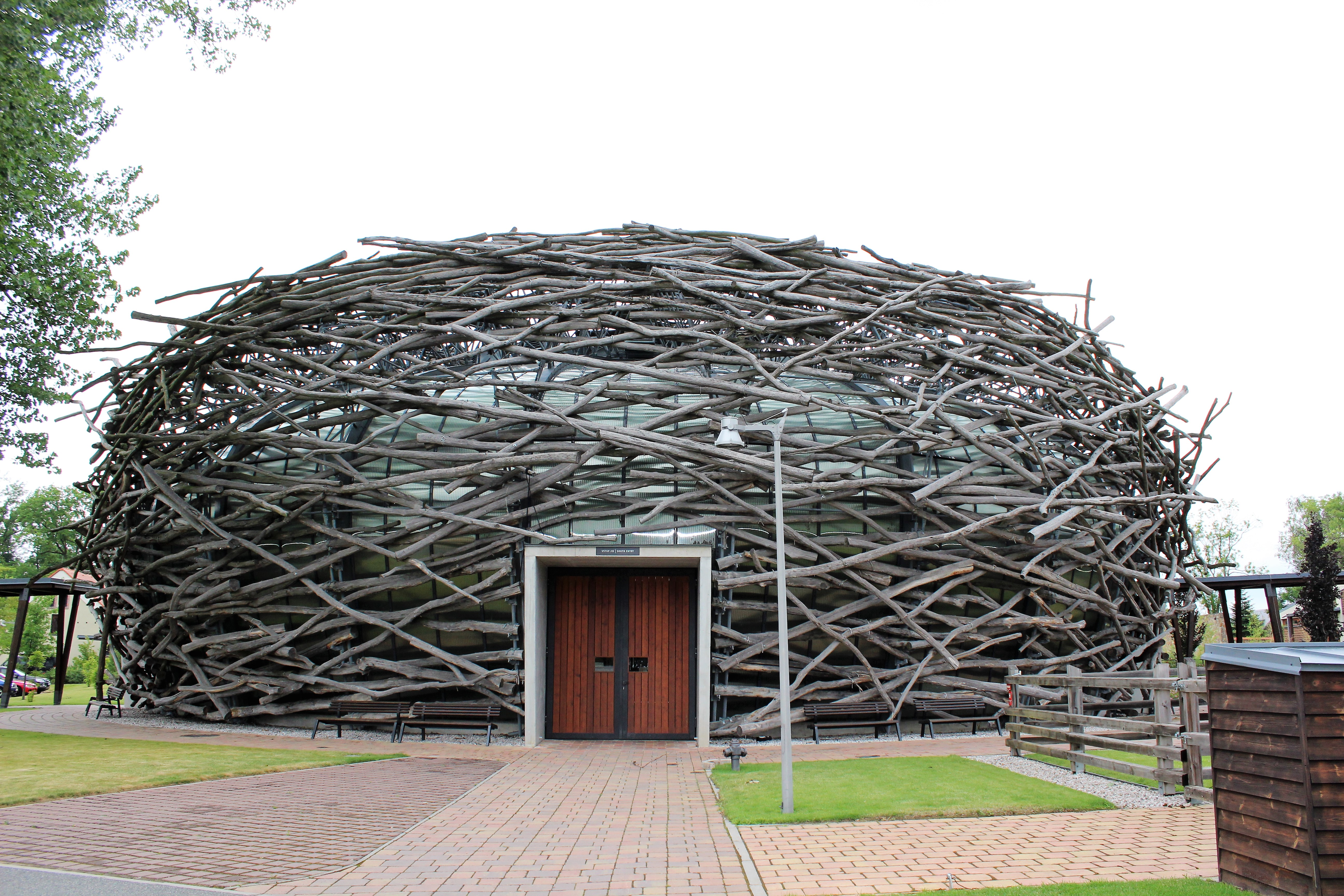 Aréna jízdárny ve tvaru čapího hnízda. Čapí hnízdo na území obce Olbramovice ve Středočeském kraji. Česká republika.